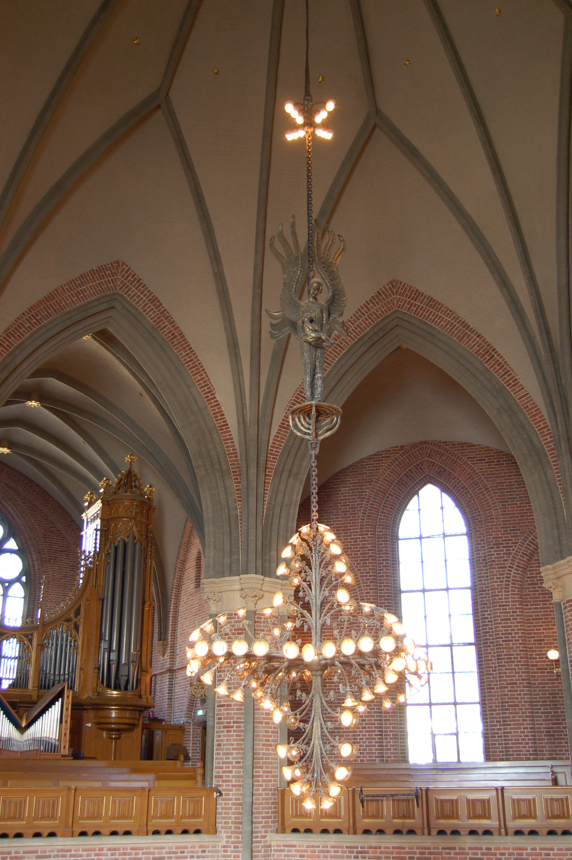 Lysekrone og engel i Trefoldighetskirken i Oslo